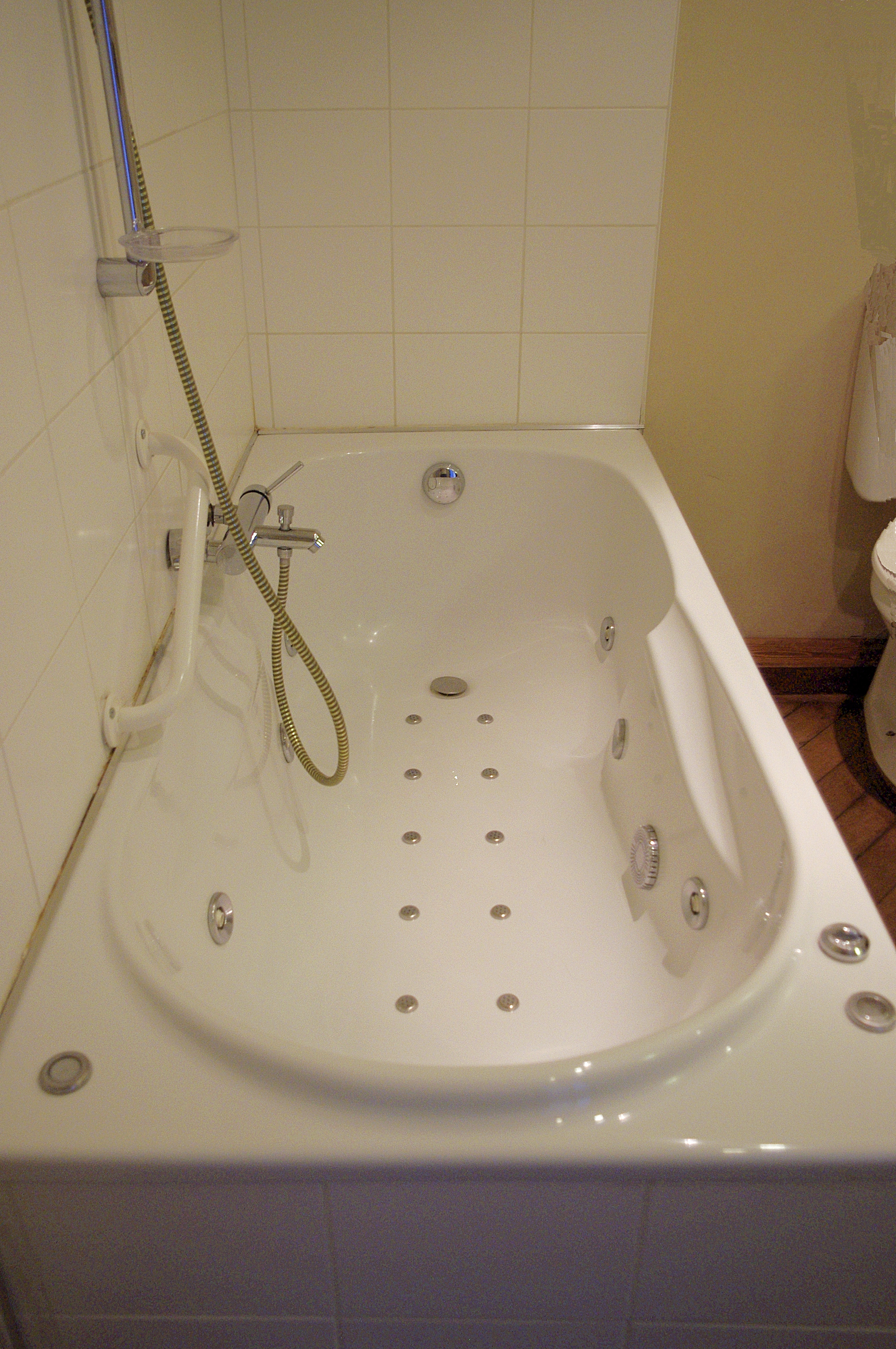 Baignoire avec buses de massage.